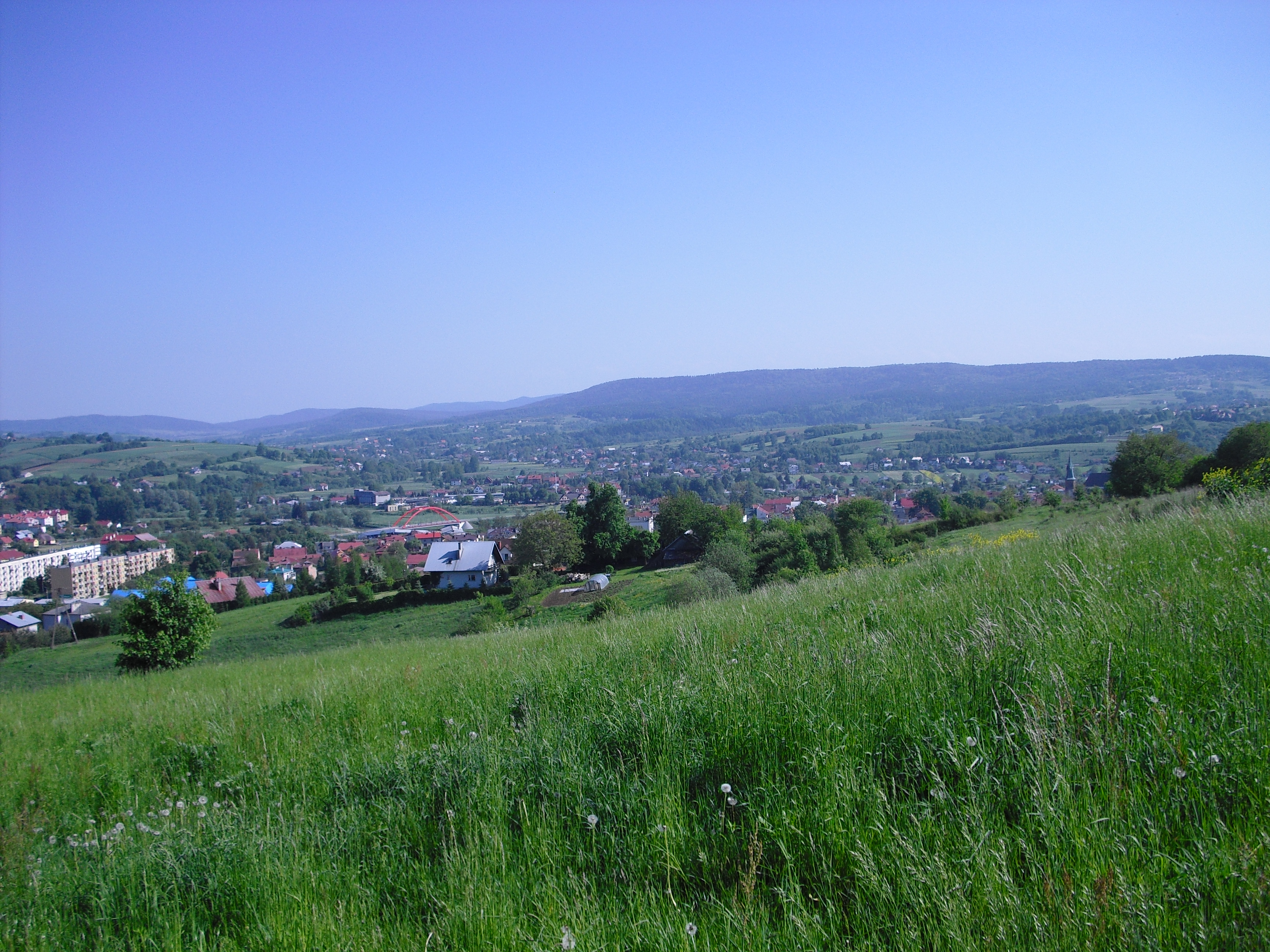 Panorama Strzyżowa - część zachodnia